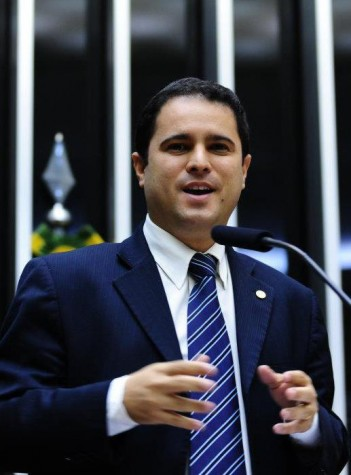 Edivaldo Holanda antes de ser prefeito.